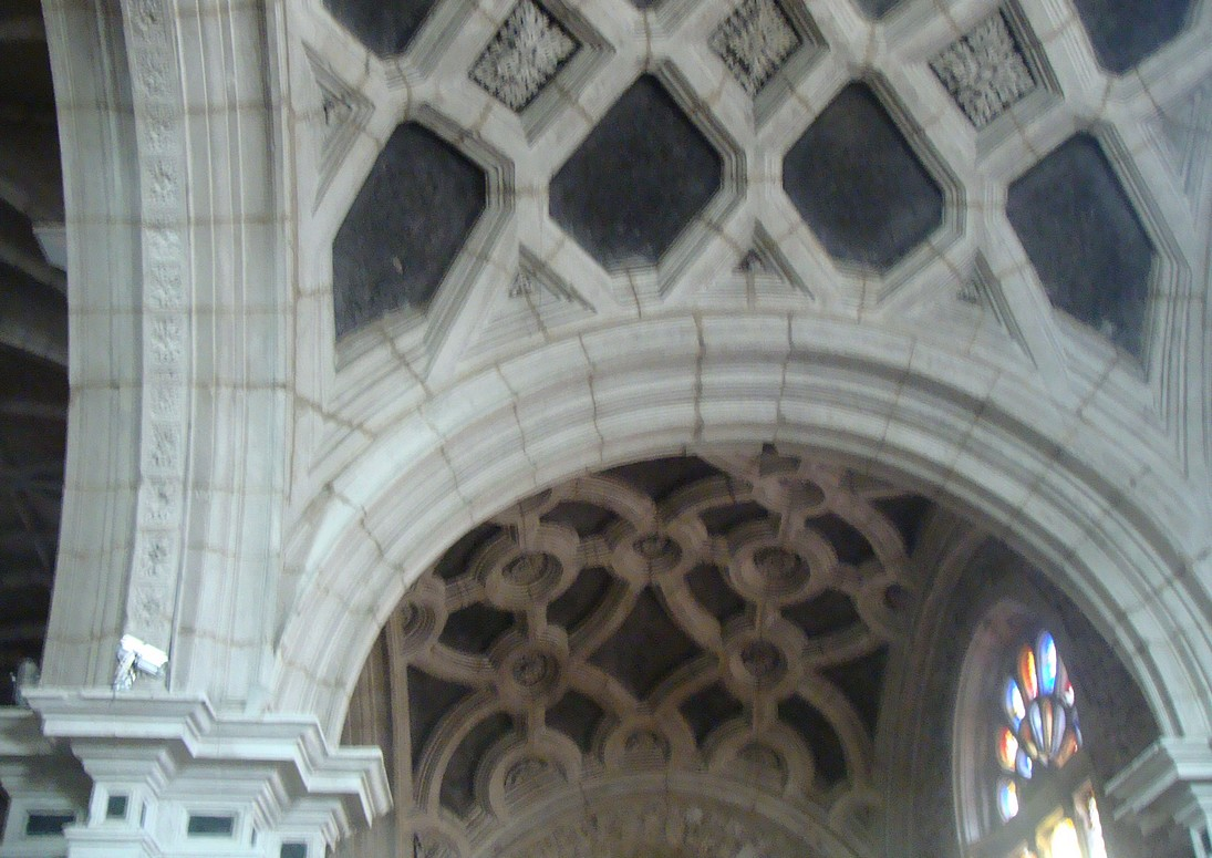 Travée latérale sud de la collégiale Notre-Dame-des-Marais de Montluel (Ain) : voûte à caissons.